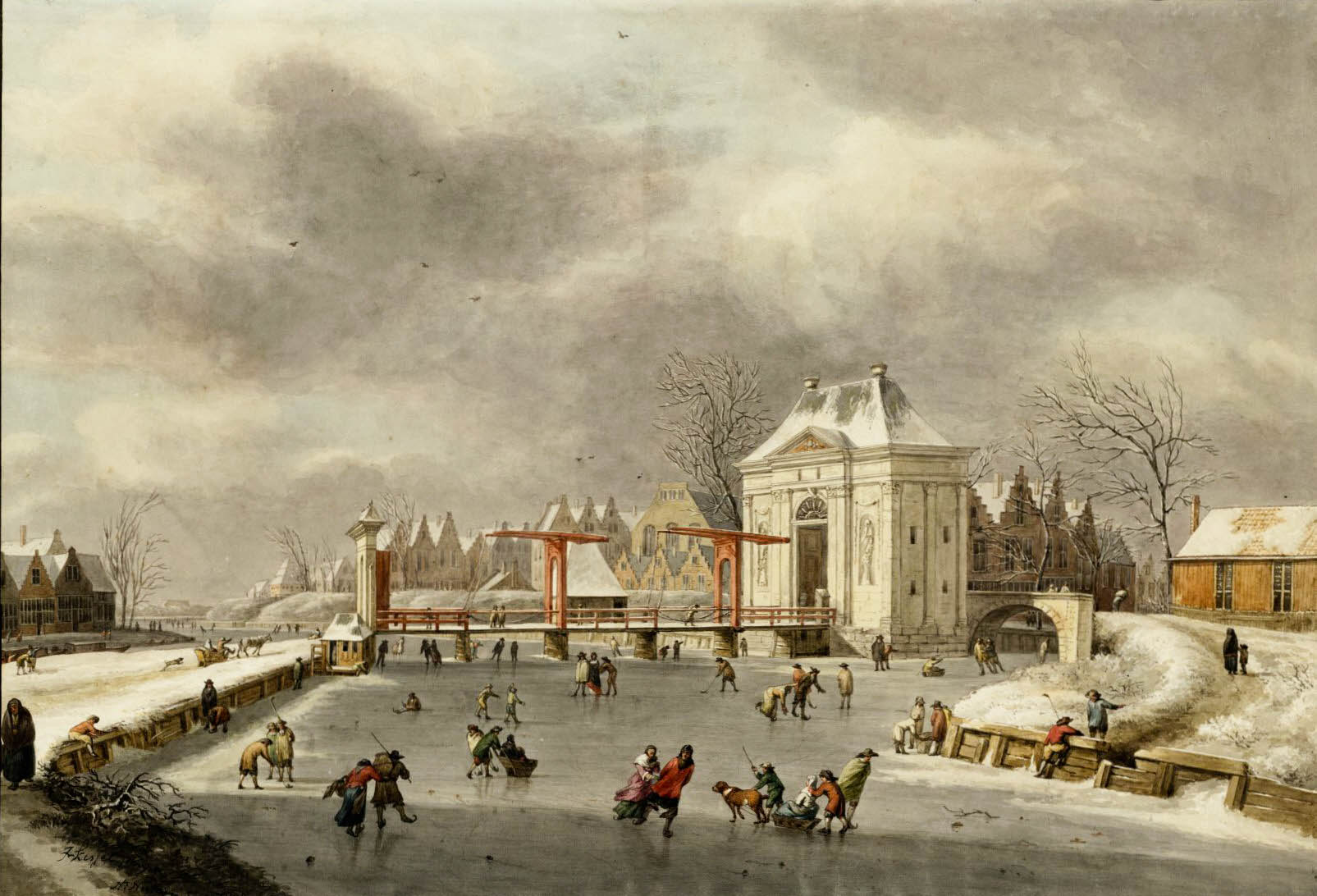 De Heiligewegspoort en omgeving gezien in noordoostelijke richting. De poort werd gebouwd in 1636 en afgebroken in 1658. Rechts achter de poort het tegenwoordige Koningsplein; links de doopsgezinde kerk Bij 't Lam. Wintergezicht naar een schilderij van J. van Kessel (1641-1680), thans in het Rijksmuseum. Datering vervaardiging: 1808.